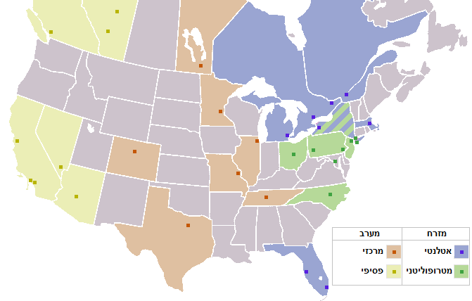 מפת קבוצות ליגת ה-NHL